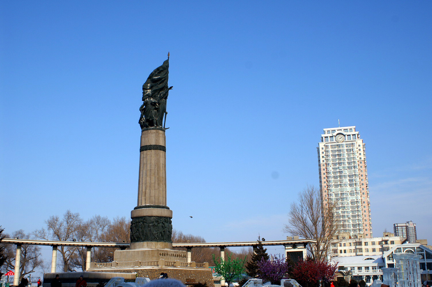 中文（香港）: 防洪纪念塔